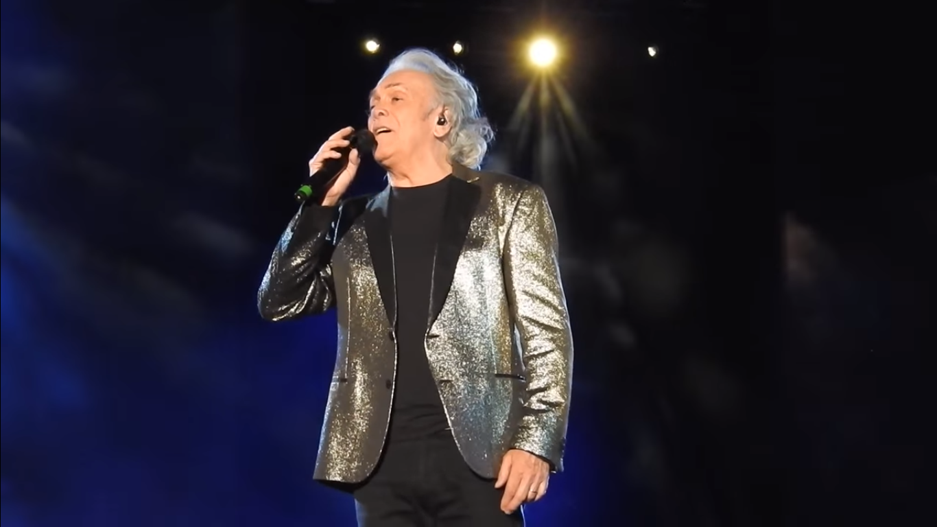 Riccardo fogli durante l'ultimo concerto del 50° anniversario dei Pooh a Messina